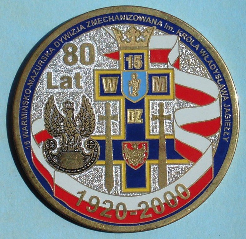 Medal pamiatkowy 15 Warmińsko Mazurskiej Dywizji Zmechanizowanej (awers)